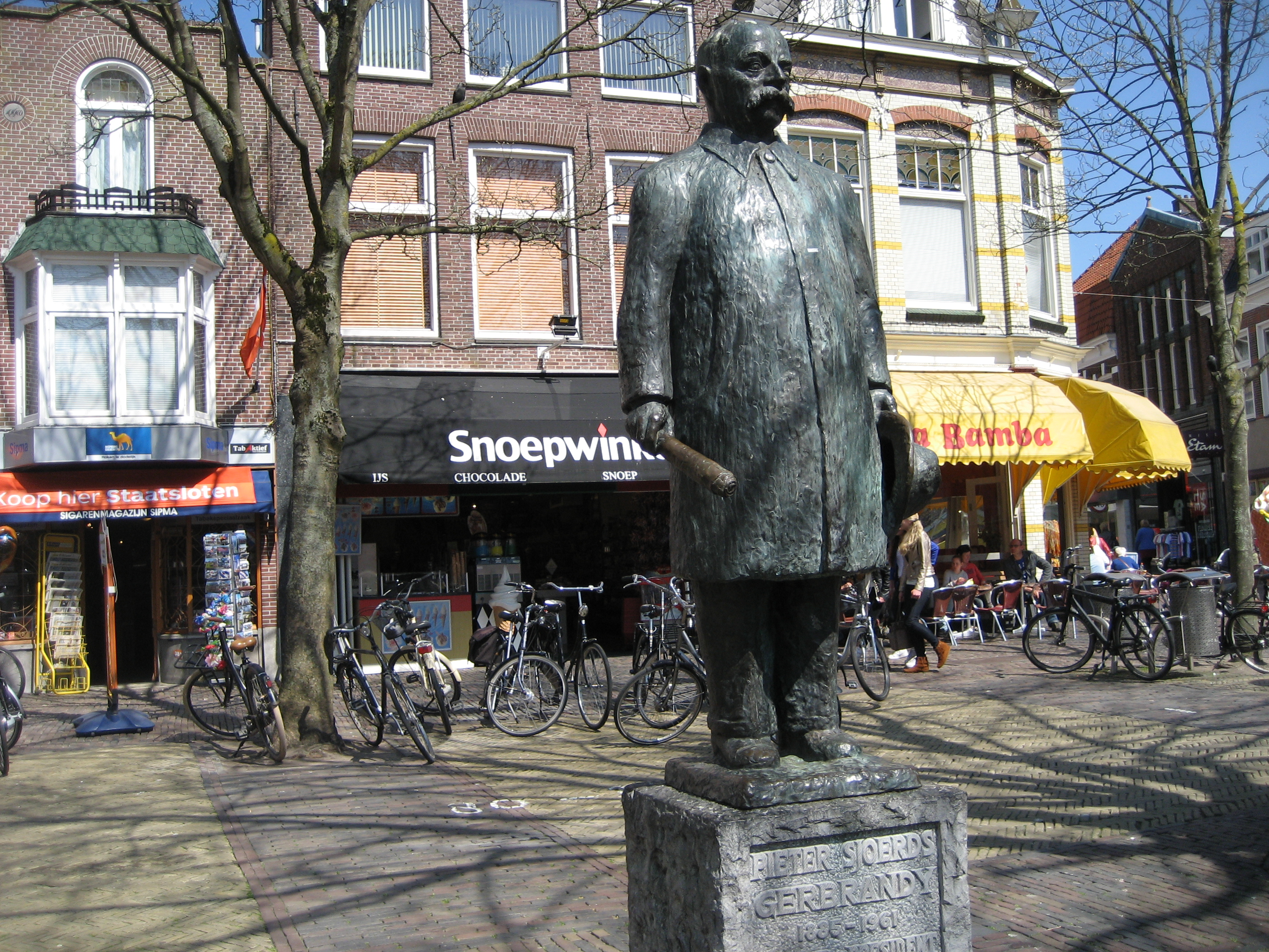 Standbeeld P.S. Gerbrandy door Maria van Everdingen, Schaapmarktplein, Sneek, Friesland, Nederland